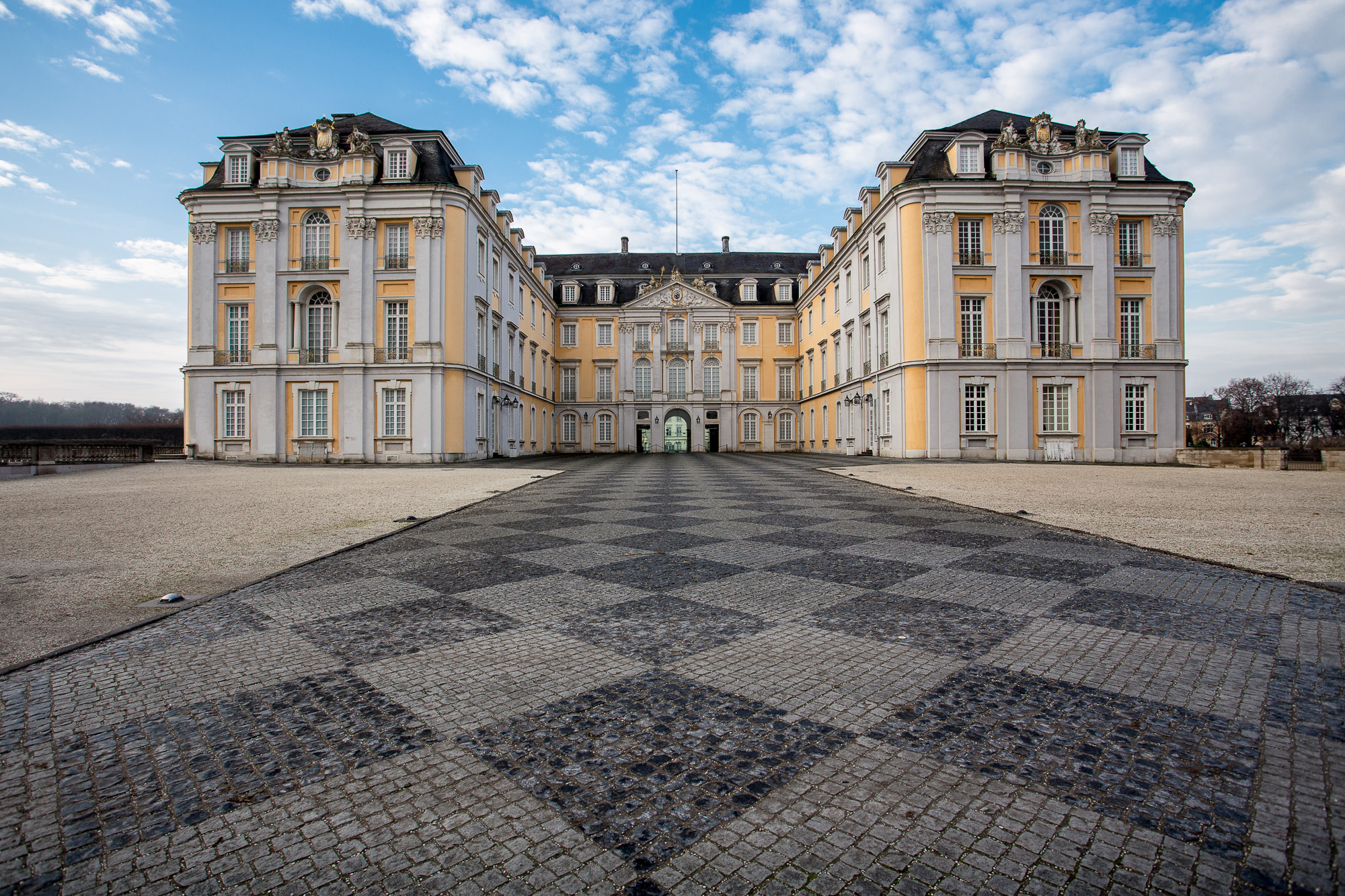 Schloss Augustusburg: Ansicht von Osten